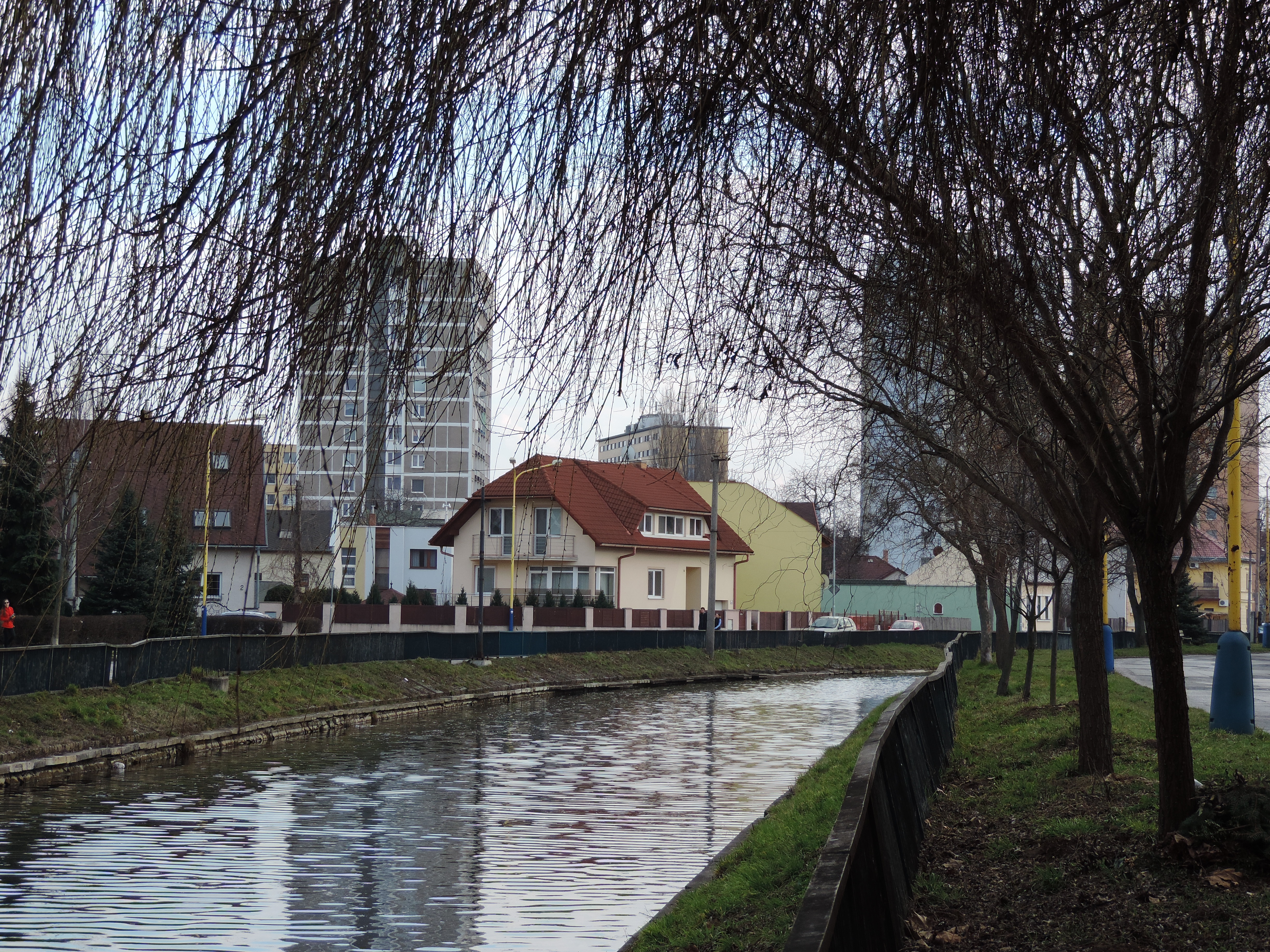 Tyršovo nábrežie